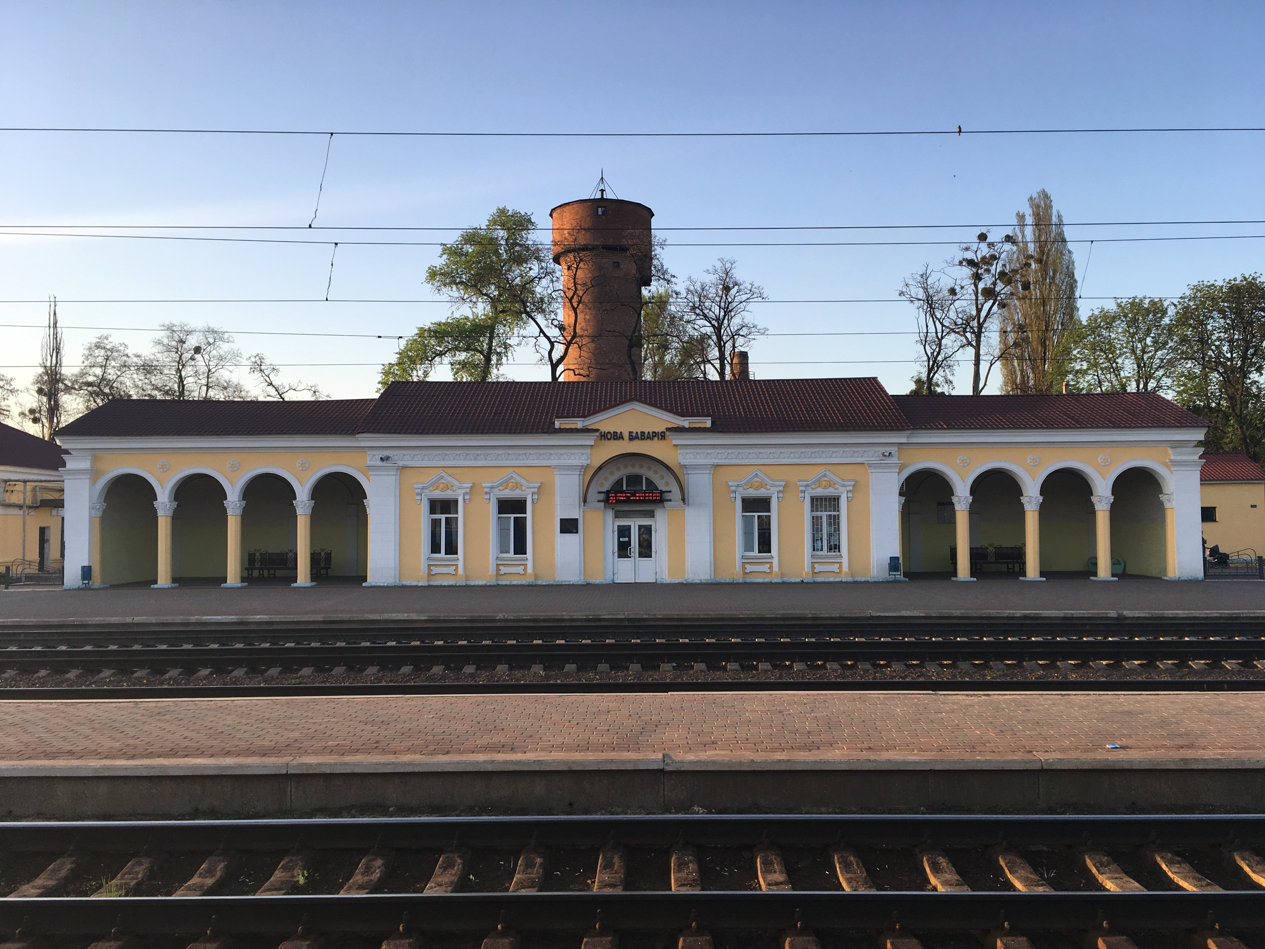 Железнодорожная станция, вокзал.